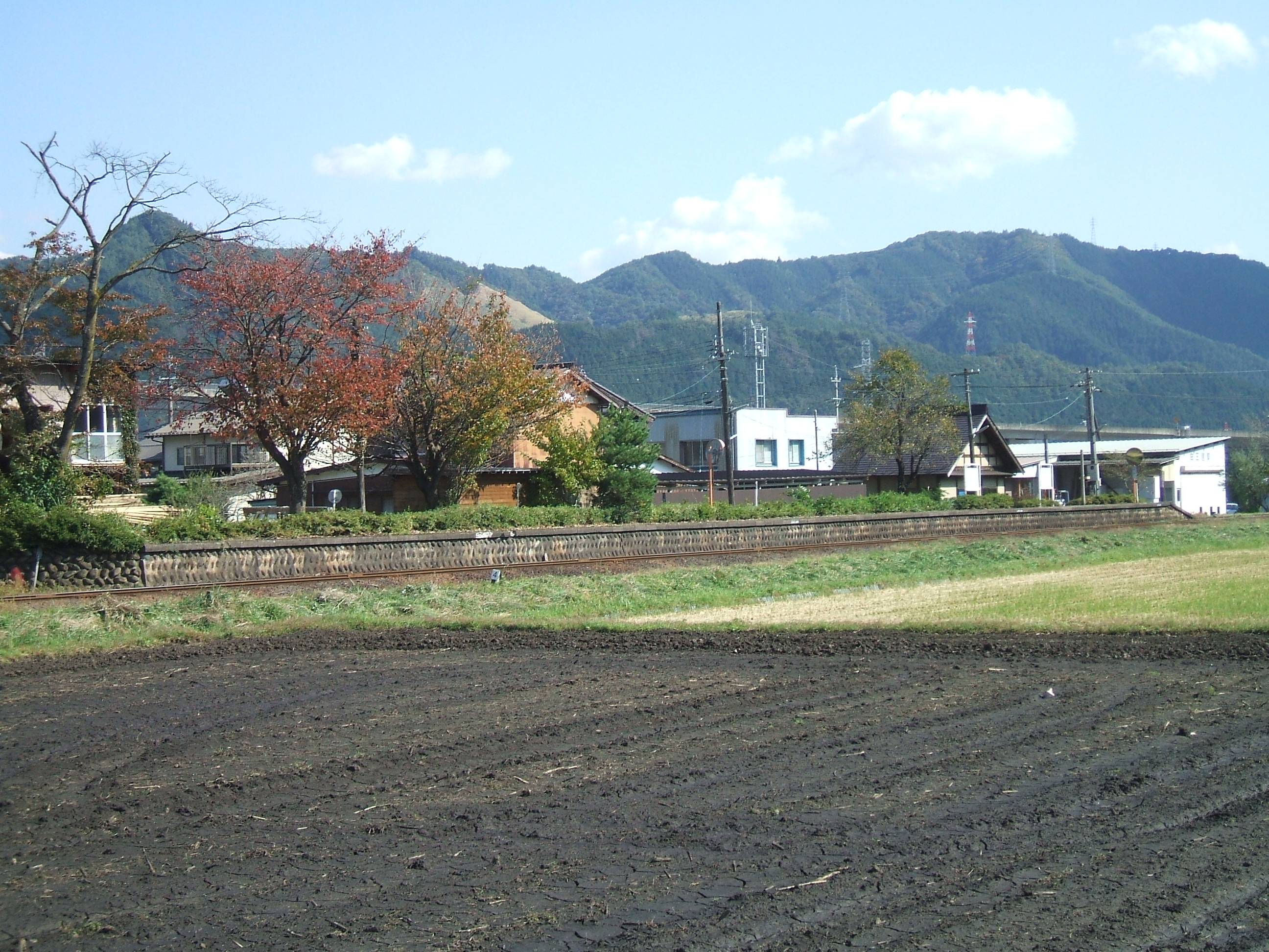 駅の様子